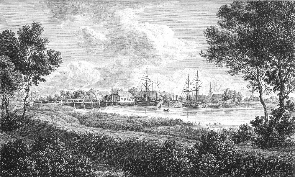 Bildvorlage von Anton Radl (1774–1852) aus dem Jahr 1818/1819: Burg bei Bremen. Das Zollhaus an der Brücke über die Lesum. Fertige und im Bau liegende Schiffe